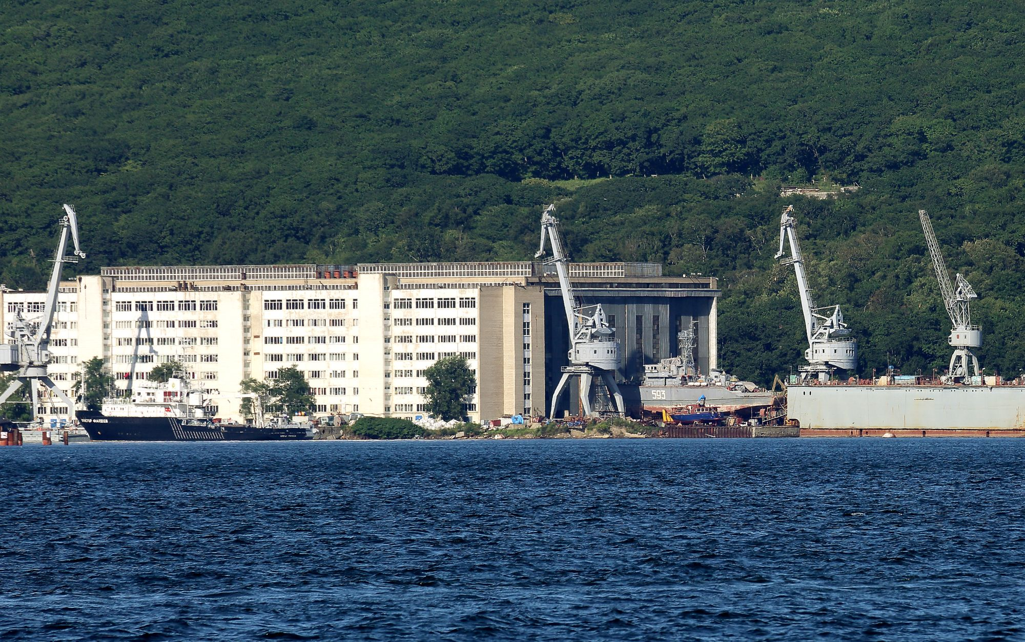 БТ-215 на Восточной Верфи (17.08.2016)